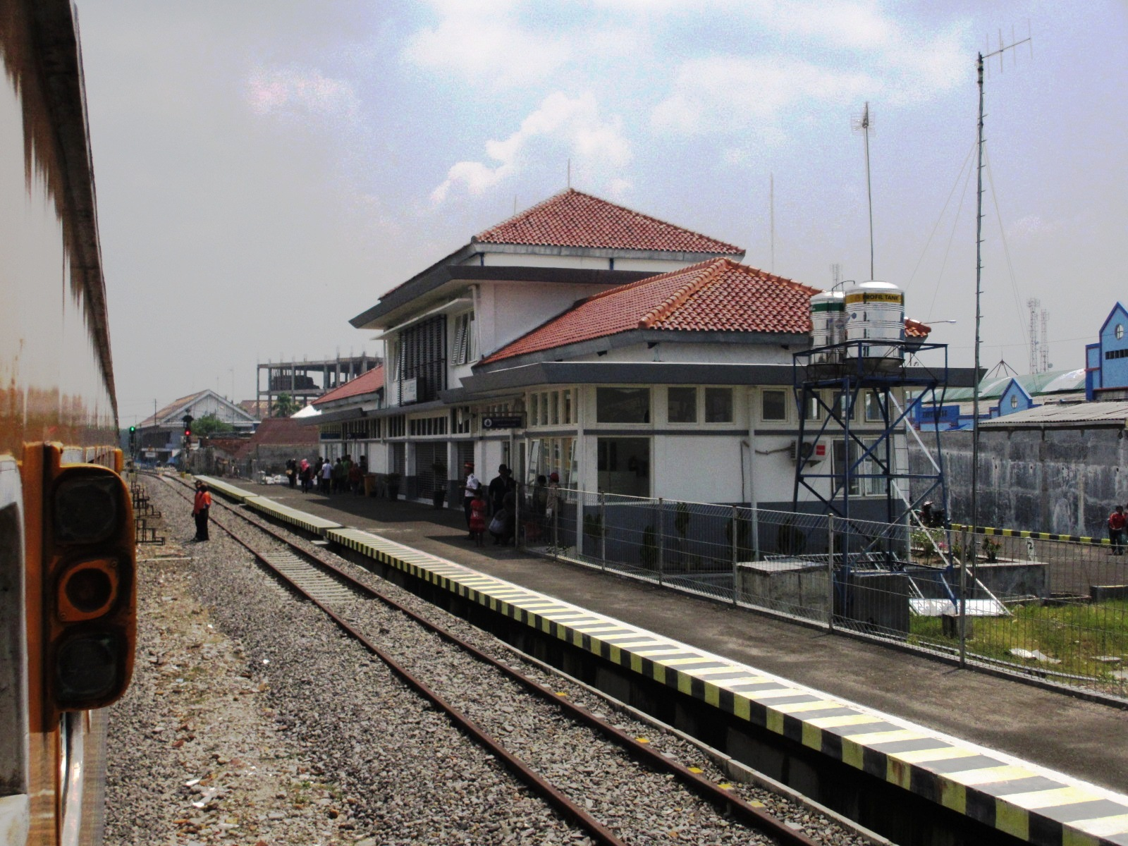 Bangunan baru Stasiun Sumberrejo, Bojonegoro.